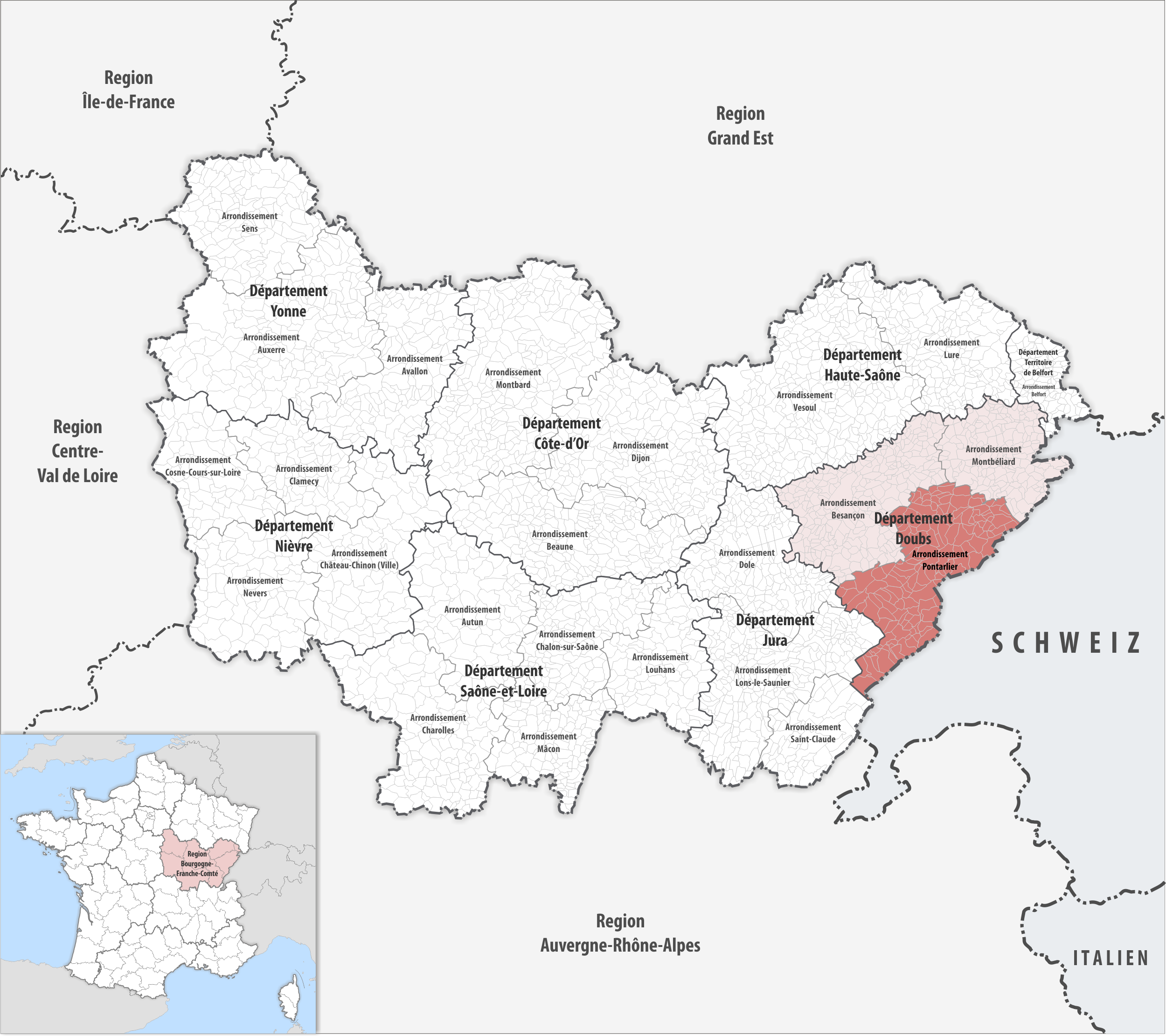 Lage des Arrondissements Pontarlier